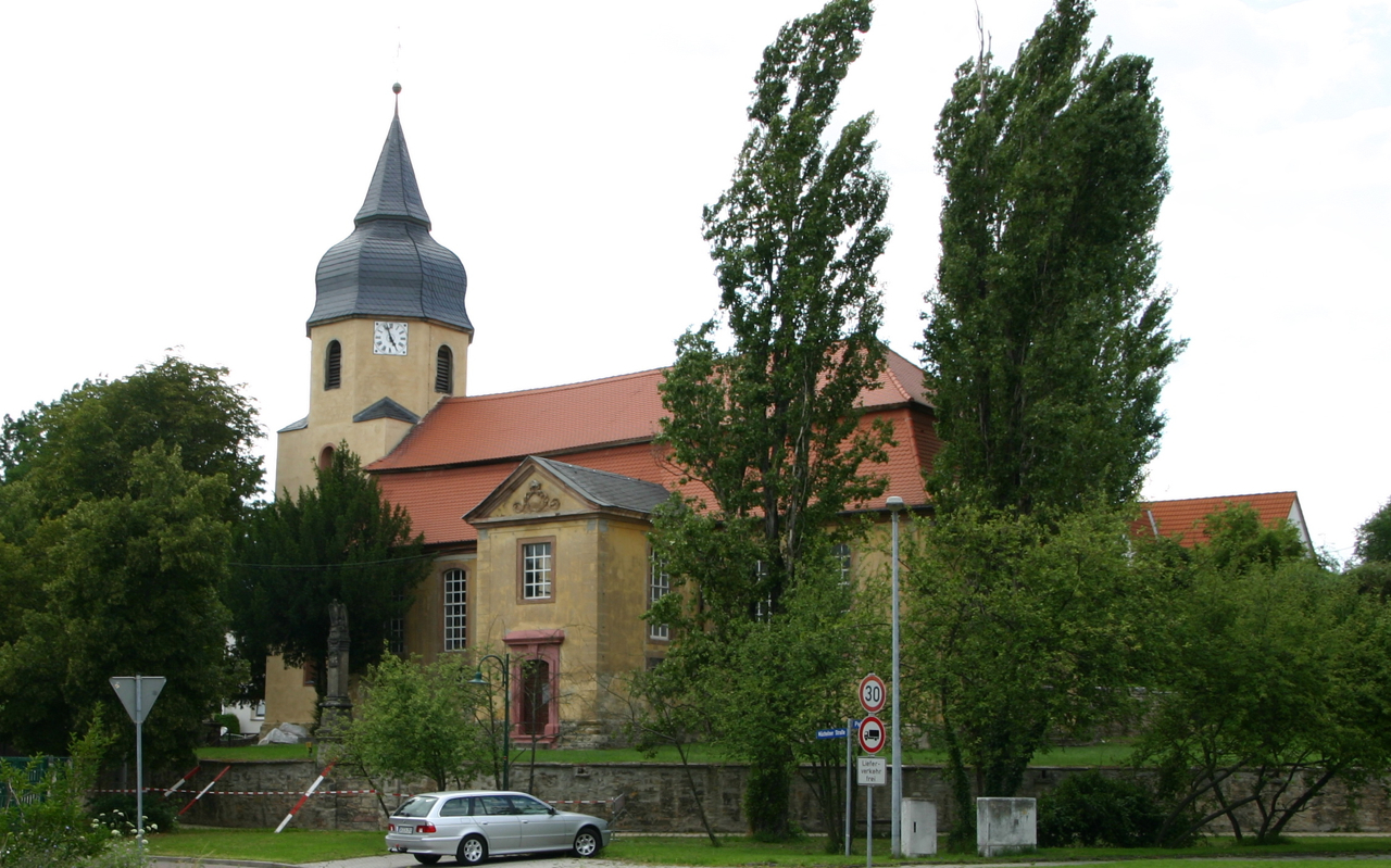 Frankleben ist ein Ortsteil von Braunsbedra[1] im Saalekreis in Sachsen-Anhalt, Deutschland.